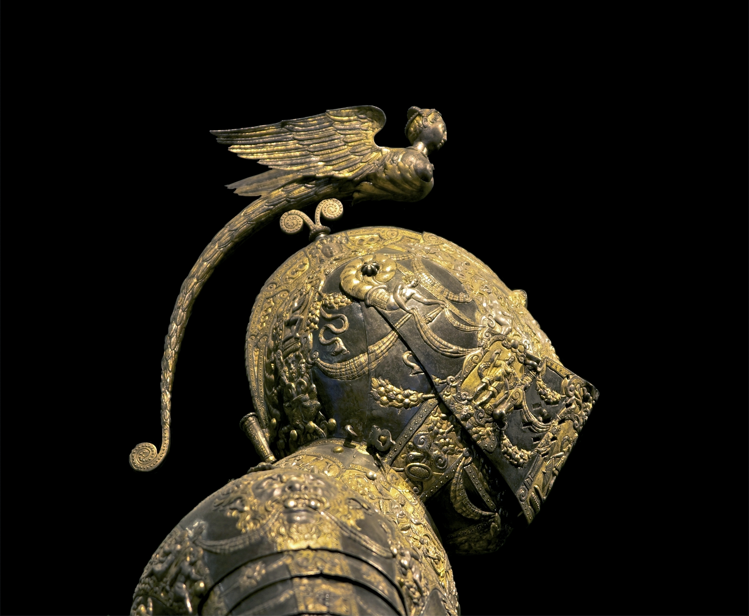 Armure de parade pour cheval et cavalier, détail, le casque.